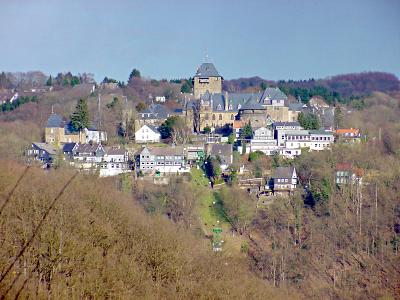 Schloss Burg an der Wupper Andere Versionen